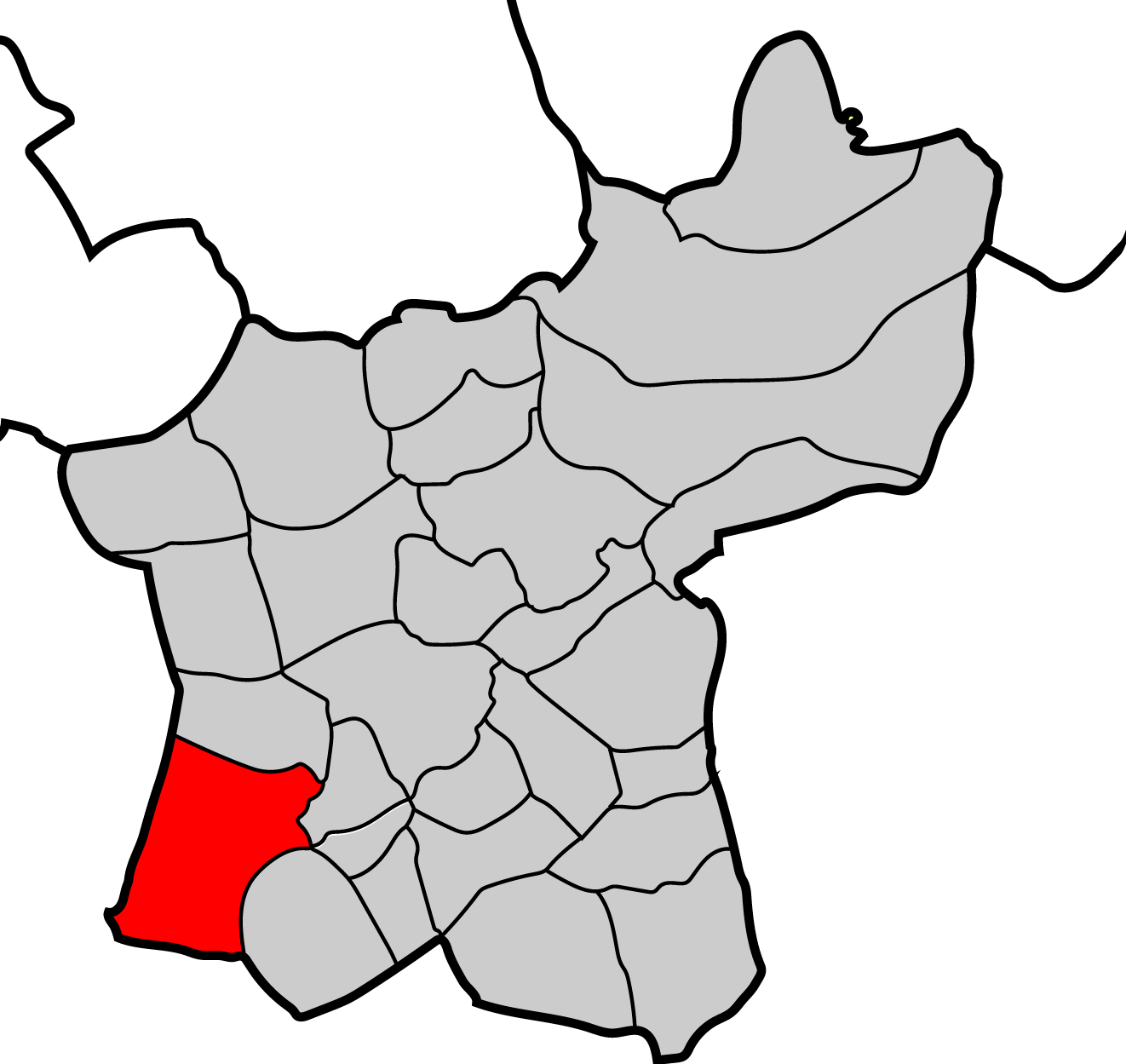 Mapa parroquia de Covas Baralla